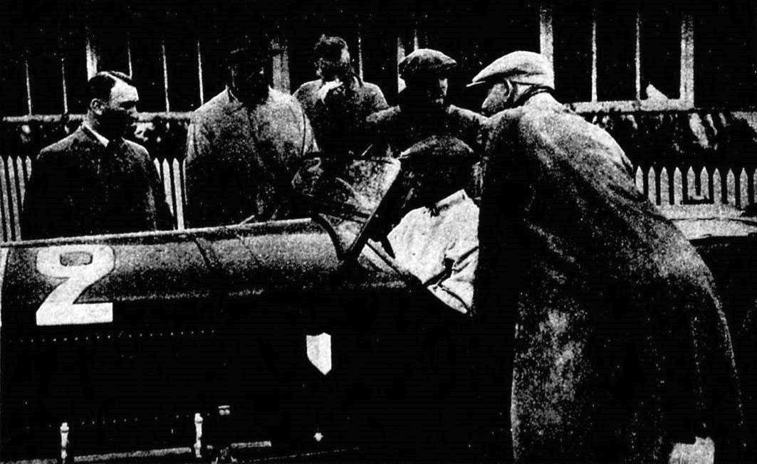 'Heldé' (Pierre Louis-Dreyfus) aux 24 Heures du Mans 1935, deuxième sur Alfa Romeo 8C 2300